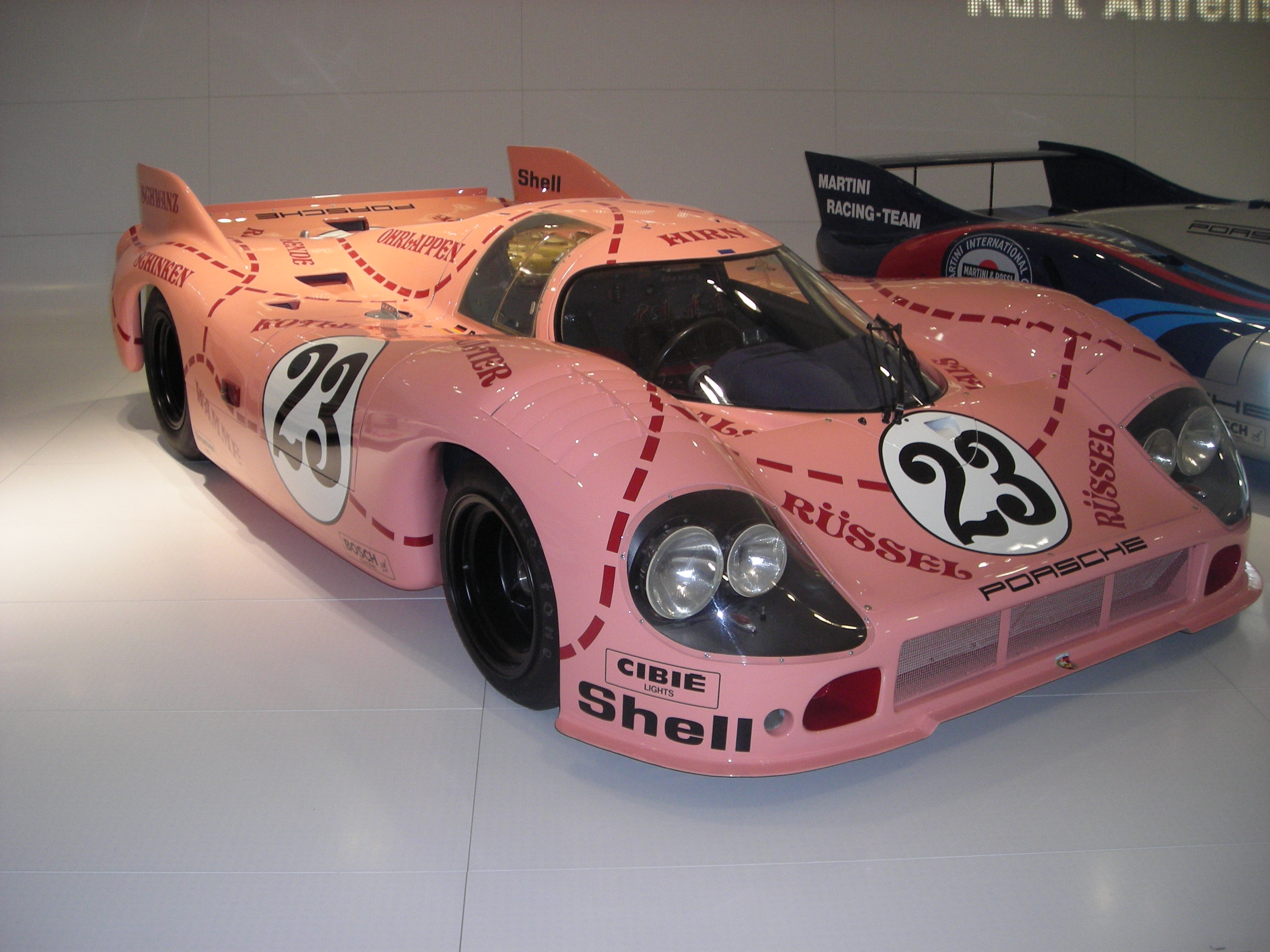 Porsche 917/20 of Reinhold Joest and Willybert Kauhsen in the Porsche Museum at Stuttgart.